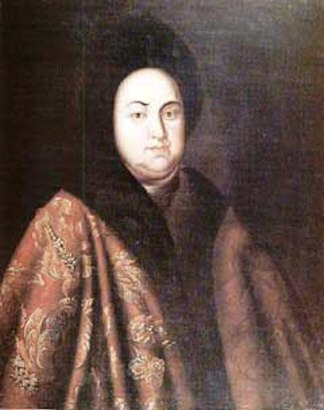 Eudoxia Lopukhina. Неизвестный художник Портрет царицы Евдокии Фёдоровны, урожд. Лопухиной II половина XVIII в. Копия с оригинала I четверти XVIII в. Холст, масло. 86,5х70 см Государственный музей керамики и "Усадьба Кусково XVIII века"